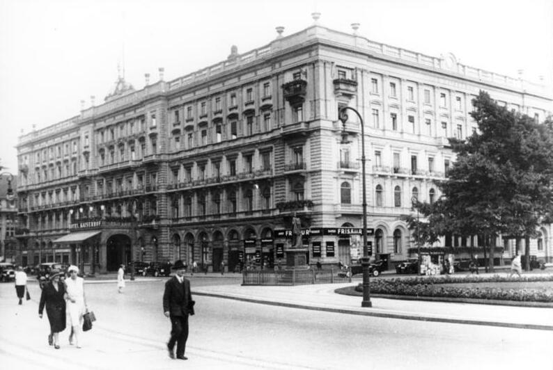 Berlin, Wilhelmplatz, Hotel "Kaiserhof" ADN-Zentralbild Berlin 1931 Das Hotel "Kaiserhof" am Wilhelmplatz. Scherl Bilderdienst